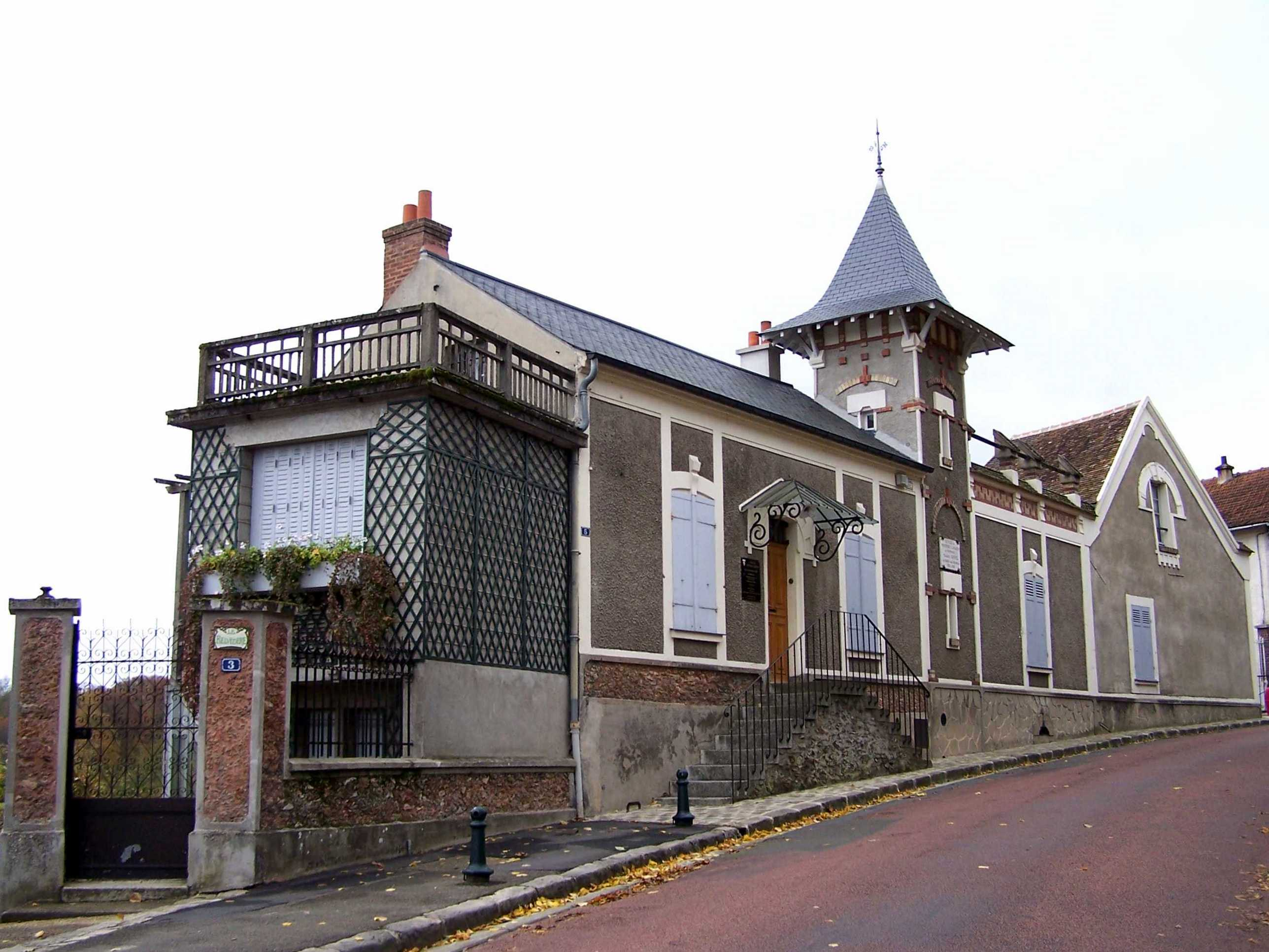 Wohnhaus Maurice Ravels in Montfort-l'Amaury (Yvelines, Frankreich)